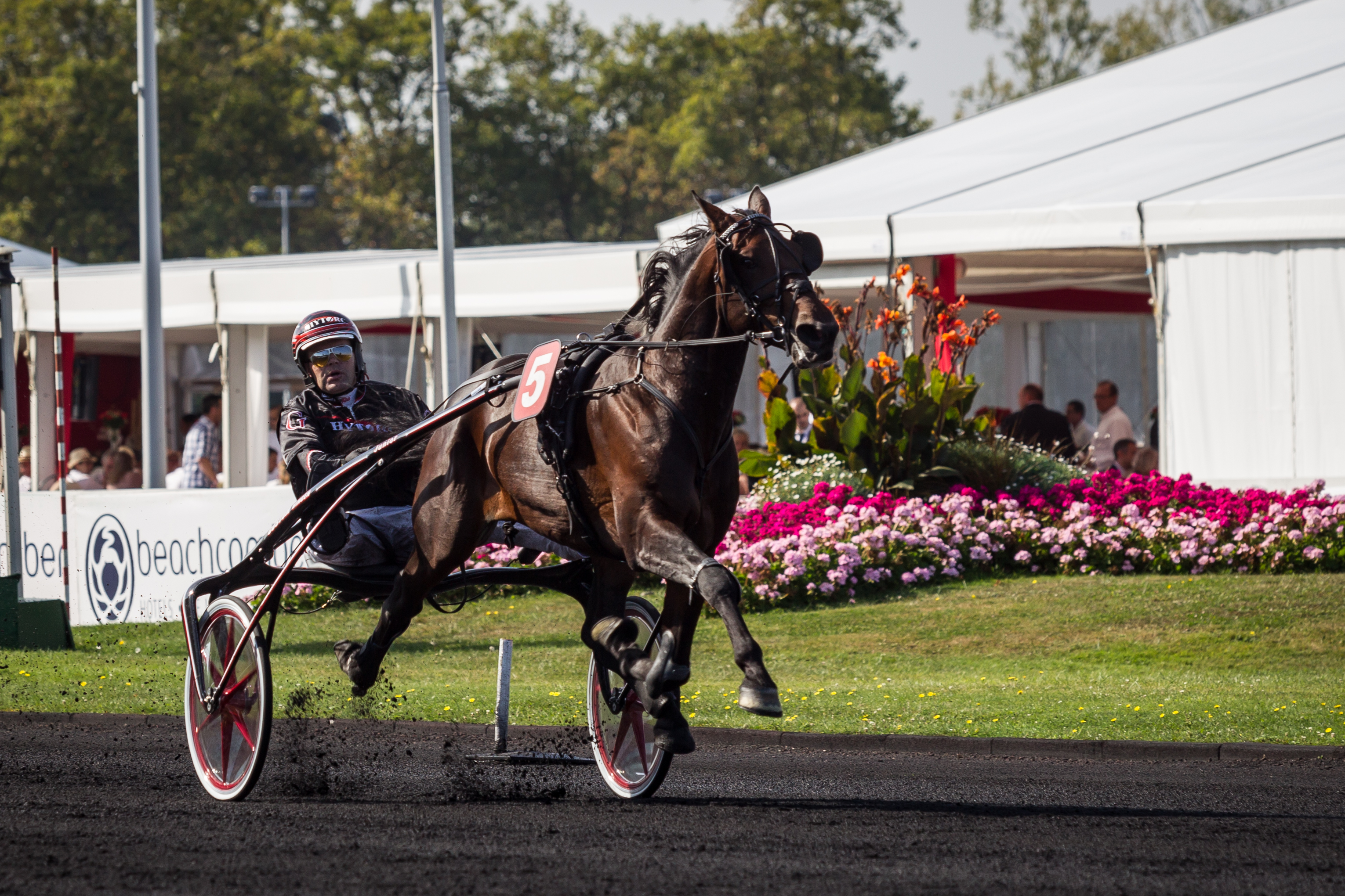 Support Justice og Geir Vegard Gundersen forbereder seg til Championnat Europeen des 5 ans på Vincennes 280914.